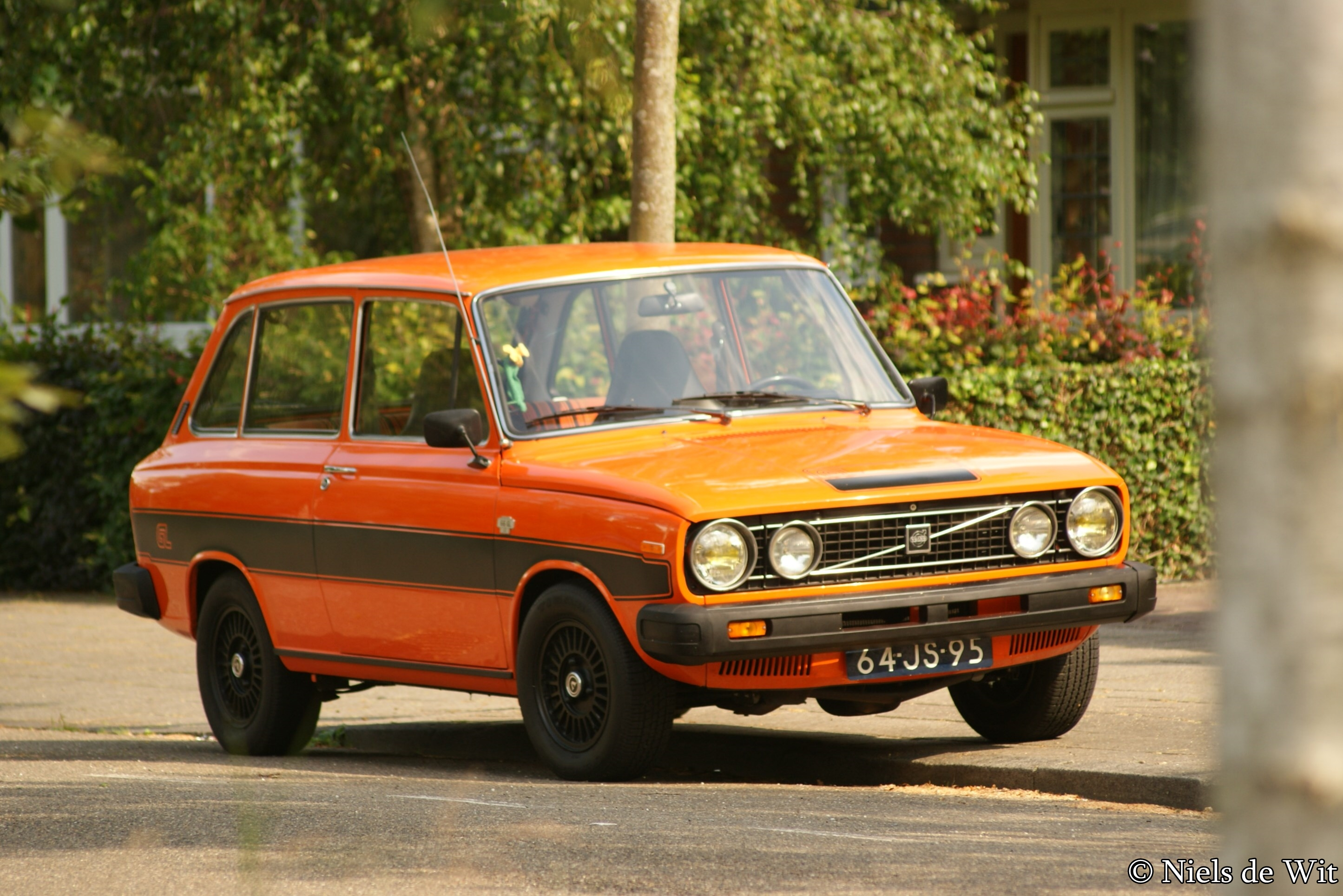 64-JS-95